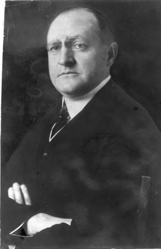 Frhr.v. Richthofen (Hildesheim). 19.2.1919 1043-19